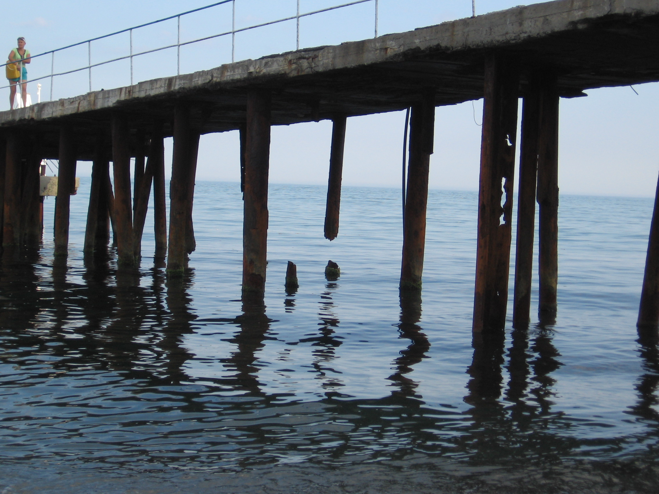 Фото